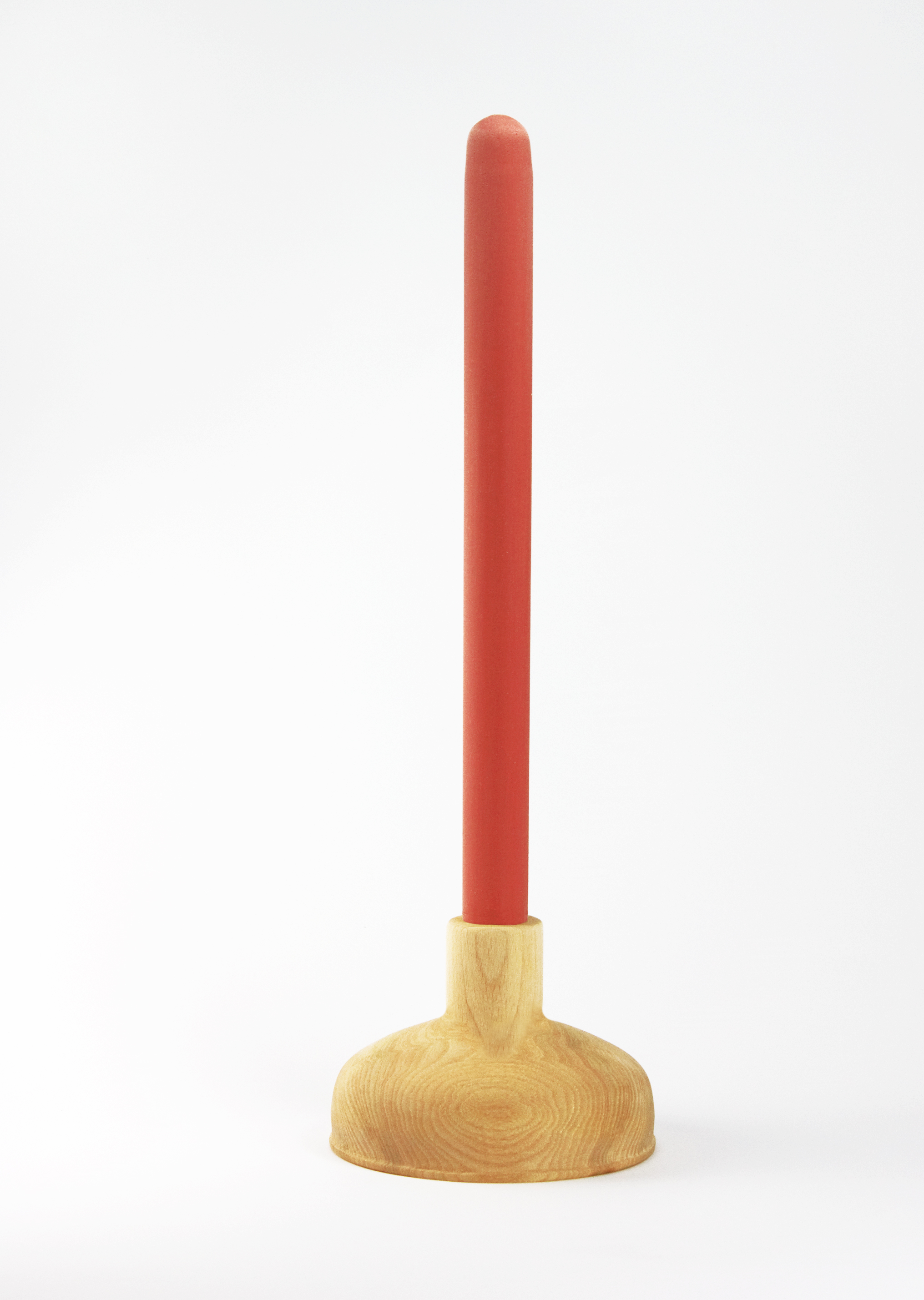 art for every day